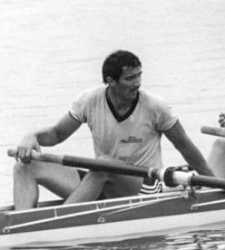 Thomas Bänsch